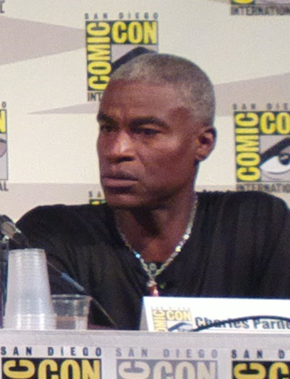 Charles Parnell Comic Con 2014